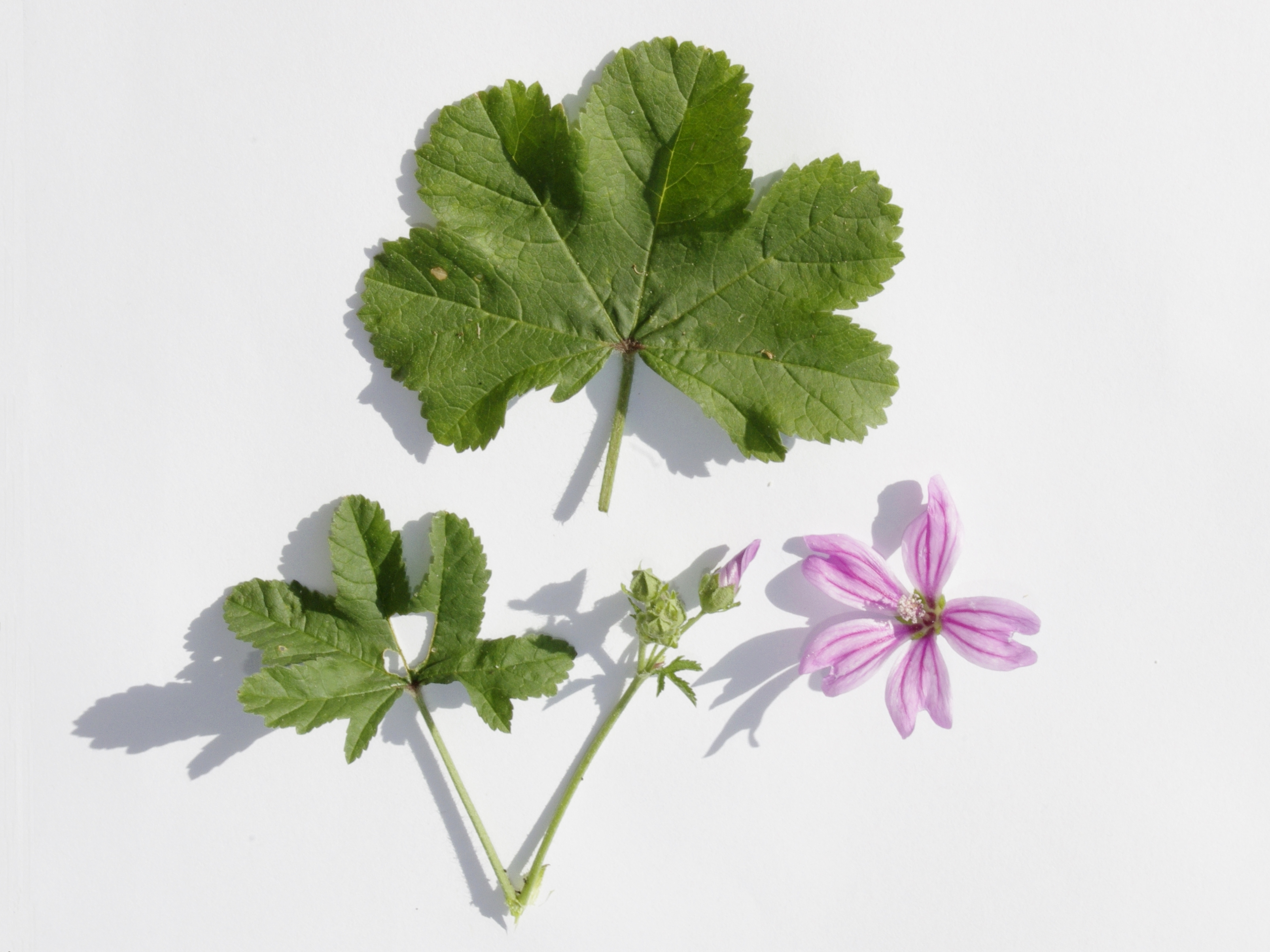 Grande mauve (malva sylvestris à Javerlhac-et-la-Chapelle-Saint-Robert, Dordogne